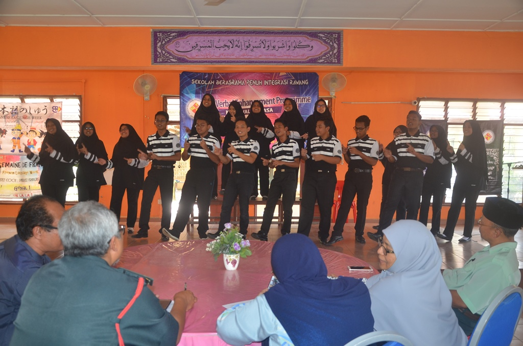 Pelajar Bahasa Perancis Tingkatan 4 sedang membuat persembahan bersempena dengan Majlis Penutupan Verbal Enhancement Programme (VEP) 2017 bertempat di Dewan Makan SEPINTAR pada 22 November 2017.